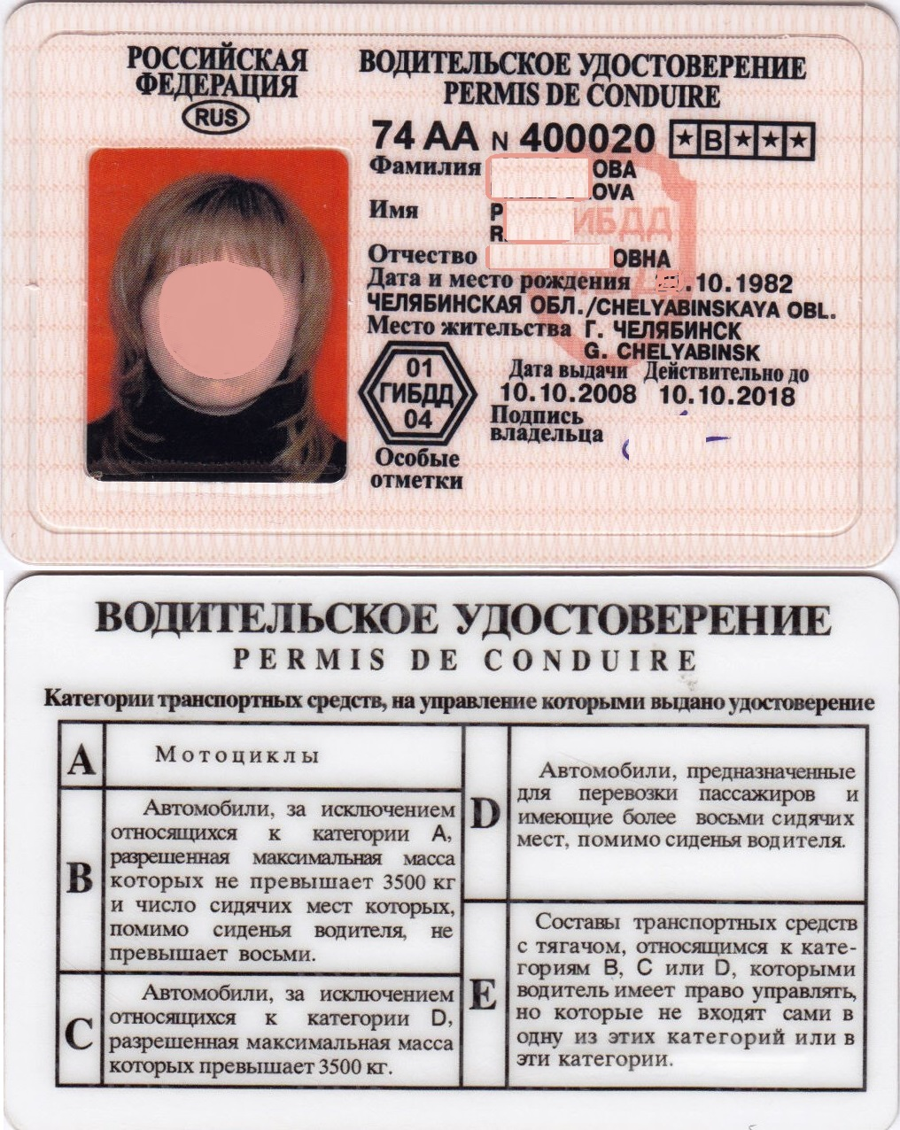 Водительское удостоверение РФ (2-го образца "международный" выдаваемый в РФ в 1999-2011 годах). Стороны А и Б. На копии закрашена часть персональной информации, изменены даты, серия и номер не позволяющая идентифицировать владельца.